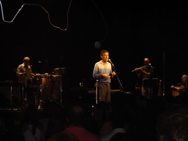 (Portuguese) O cantor e compositor brasileiro Chico Buarque, show no Canecão, Rio de Janeiro, 2007